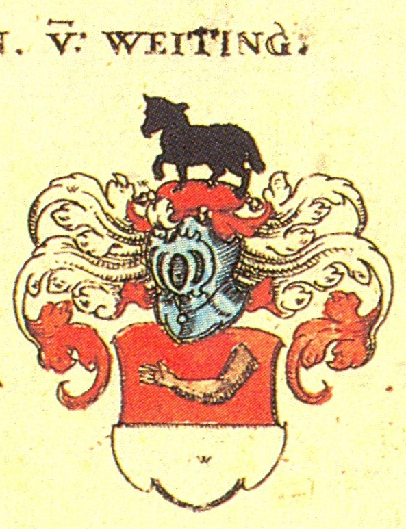 Ritterschaft und Adel in Schwaben von Weiting